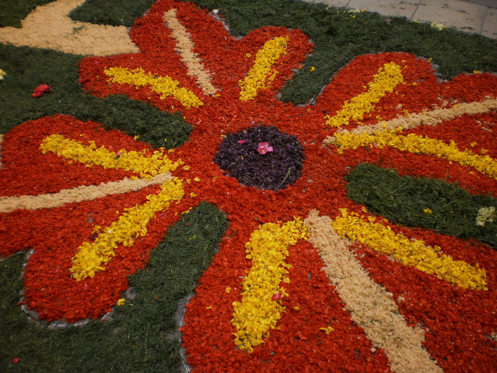 detalle de una parte de la alfombra floral que cubrió las calles durante el corpus 2012